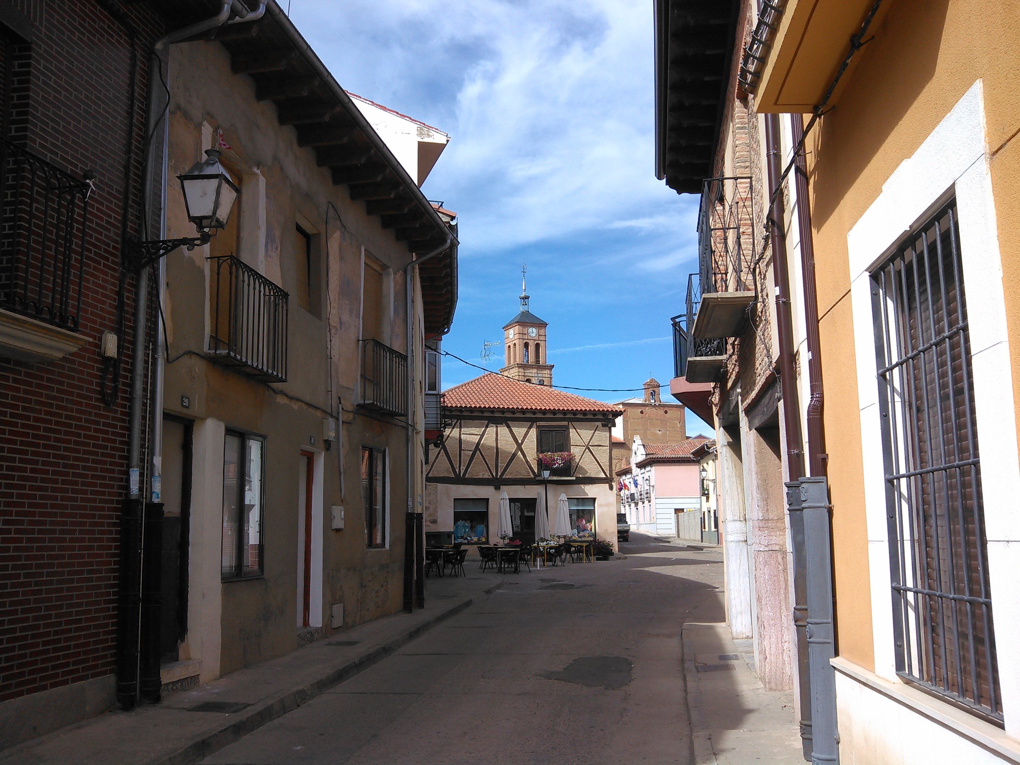 Calle Mayor de Villamañán, Castilla y León, España.